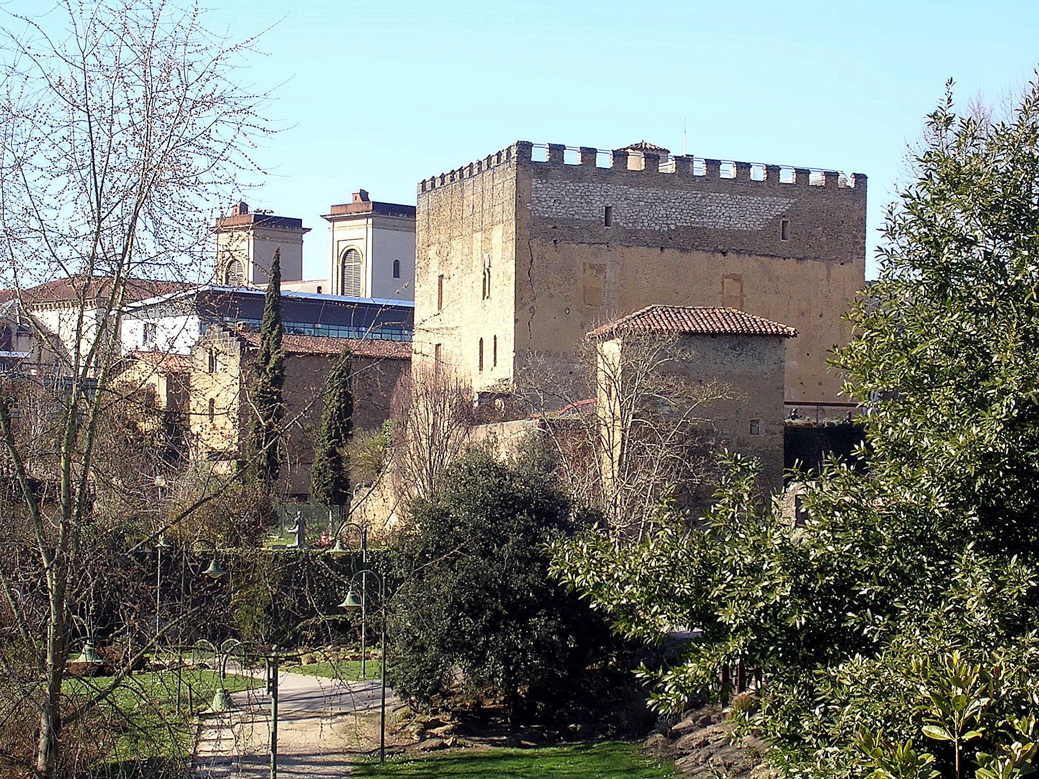 Mont-de-Marsan, vue sur le donjon Lacataye le long du Midou et l'église de la Madeleine en arrière plan.